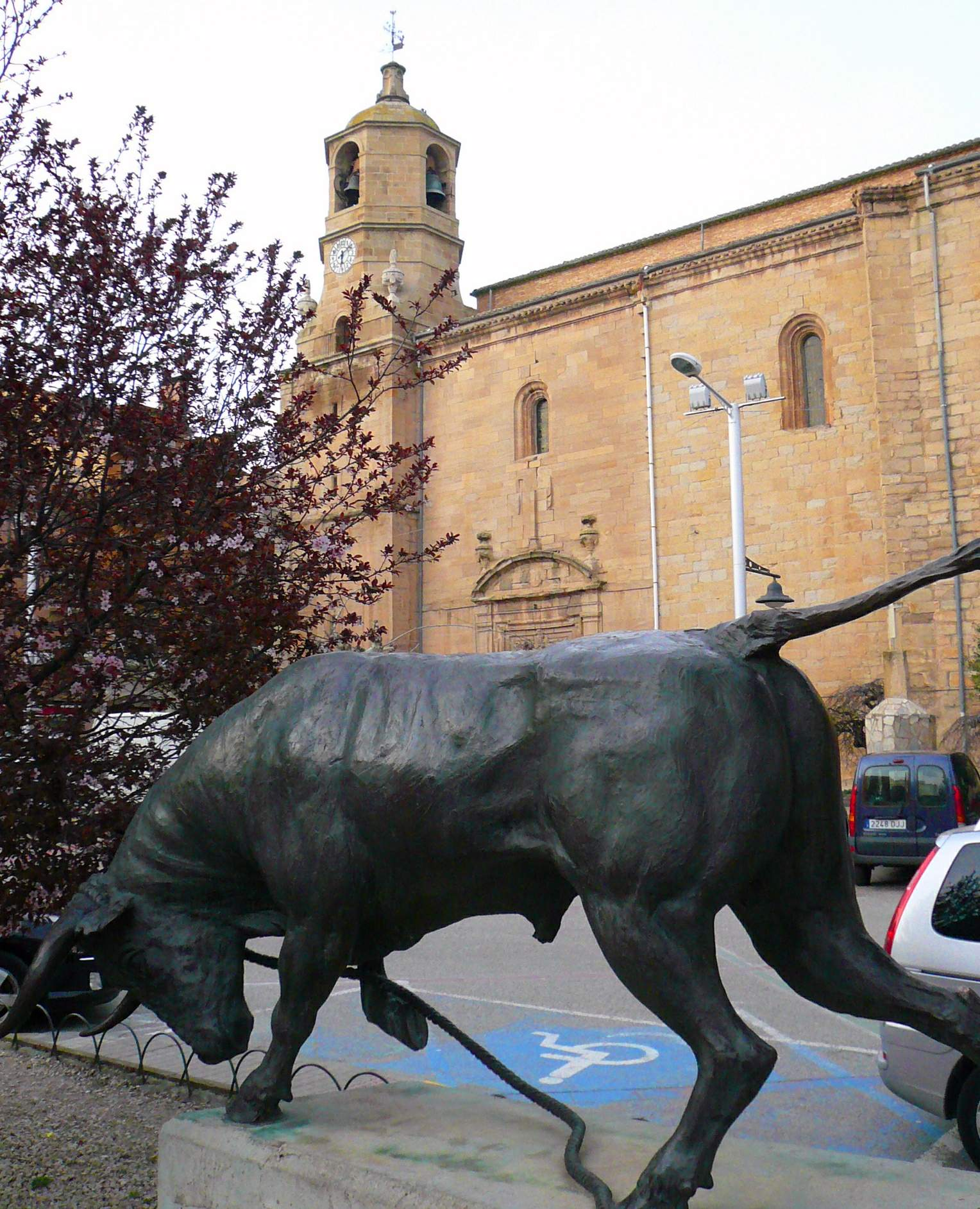 Monumento al Toro con soga (Lodosa, Navarra)